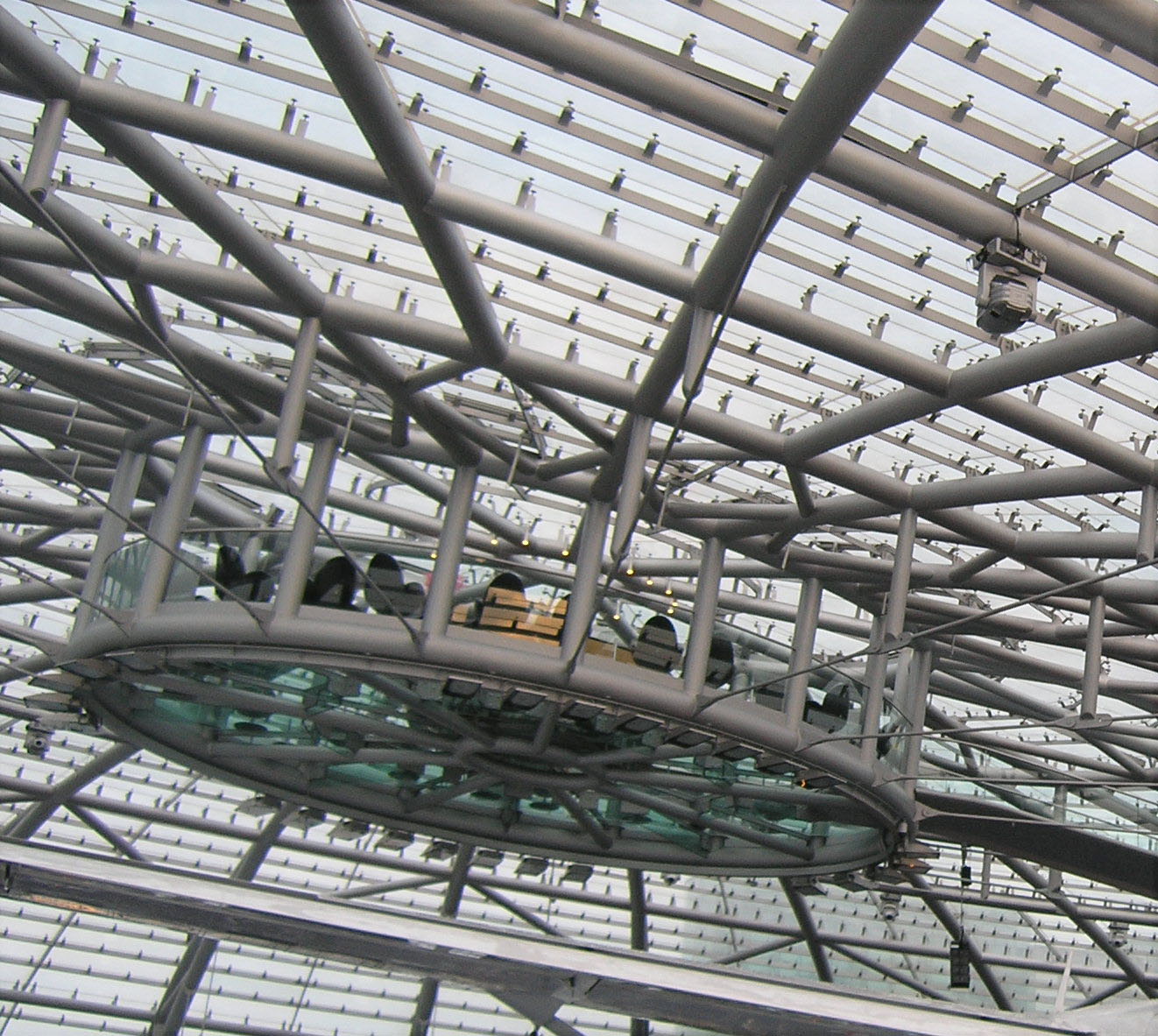 Hangar-7, schwebende Threesixty Bar